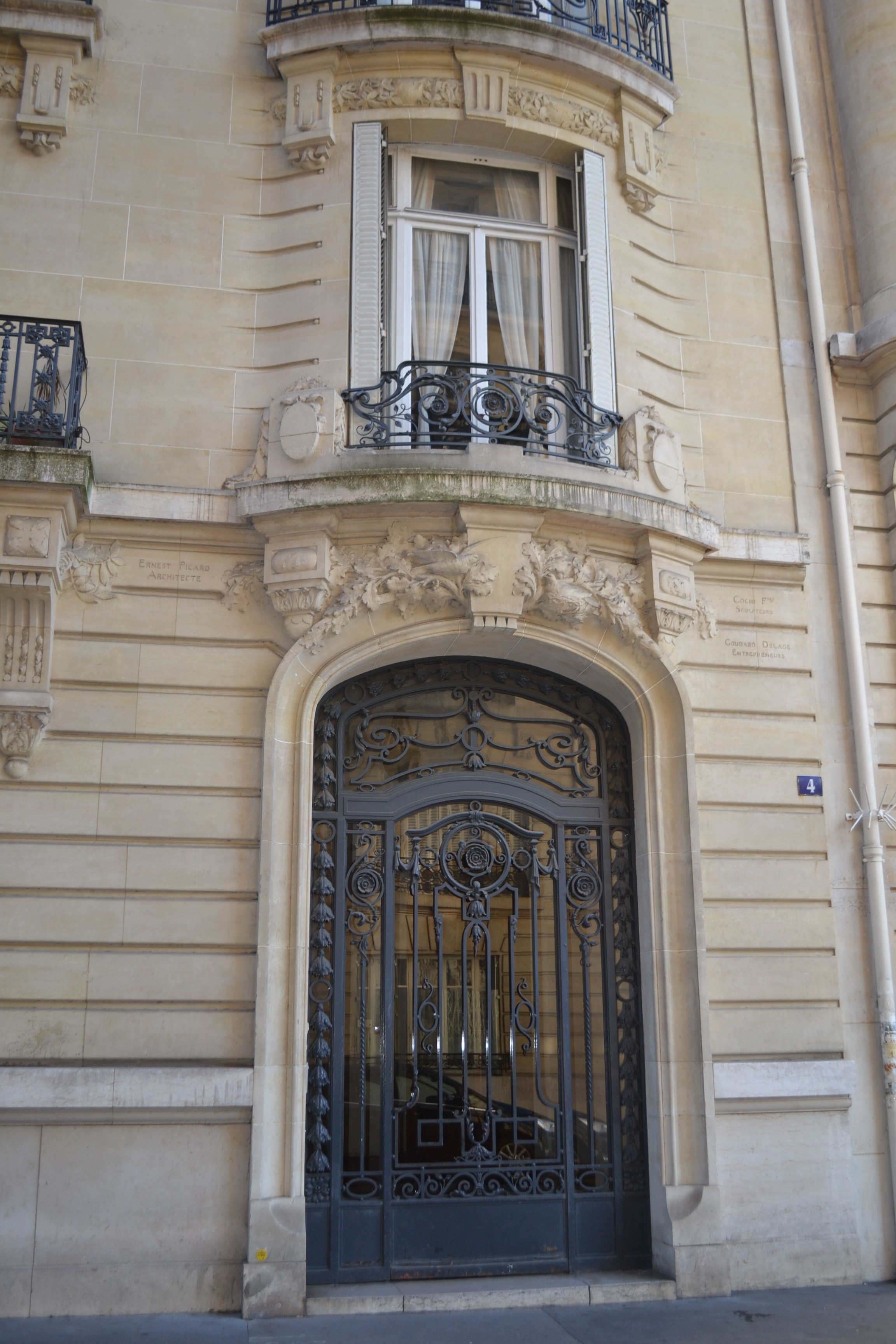 Immeuble situé au n° 4 de la rue Verdi, à Paris 16e. Architecte : Ernest Picard.